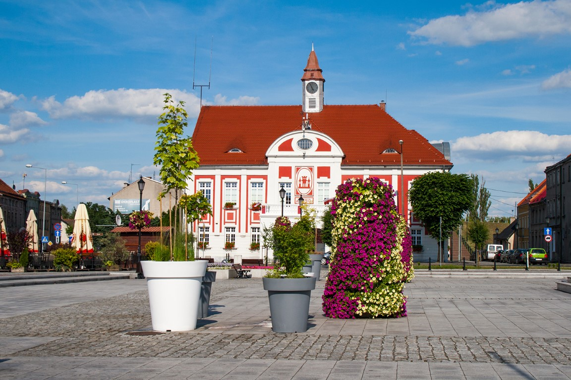 Duże donice miejskie w kolorze szarym i białym na rynku w Gostyniu.